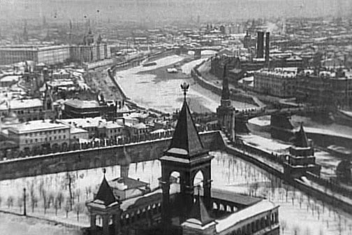 Обзор восточной стороны с высоты звонницы На переднем плане мы видим памятник императору Александру II, за ним купол церкви Константина и Елены, ru:%D2%E0%E9%ED%E8%F6%EA%E8%E9_%F1%E0%E4|Тайницкий сад . На втором плане: ru:%D0%E0%F3%F8%F1%EA%E0%FF_%ED%E0%E1%E5%F0%E5%E6%ED%E0%FF|Раушская набережная (до 1870-х гг. называлась Заяи́цкая набережная); электростанция «Общества электрического освещения 1886 года»; ru:%C1%EE%EB%FC%F8%EE%E9_%CC%EE%F1%EA%E2%EE%F0%E5%F6%EA%E8%E9_%EC%EE%F1%F2|Большой Москворецкий мост старого образца (перестроен в 1938 инженером В.С. Кирилловым по проекту архитекторов А.В. Щусева и И.Г. Сардарьян); левее, застройка Васильевской площади, ru:%CC%EE%F1%EA%E2%EE%F0%E5%F6%EA%E0%FF_%F3%EB%E8%F6%E0_%28%CC%EE%F1%EA%E2%E0%29|Москворецкой улицы и Зарядья, Императорский Воспитательный дом. Кадры из фильма "Москва под снегом", 1908 год.